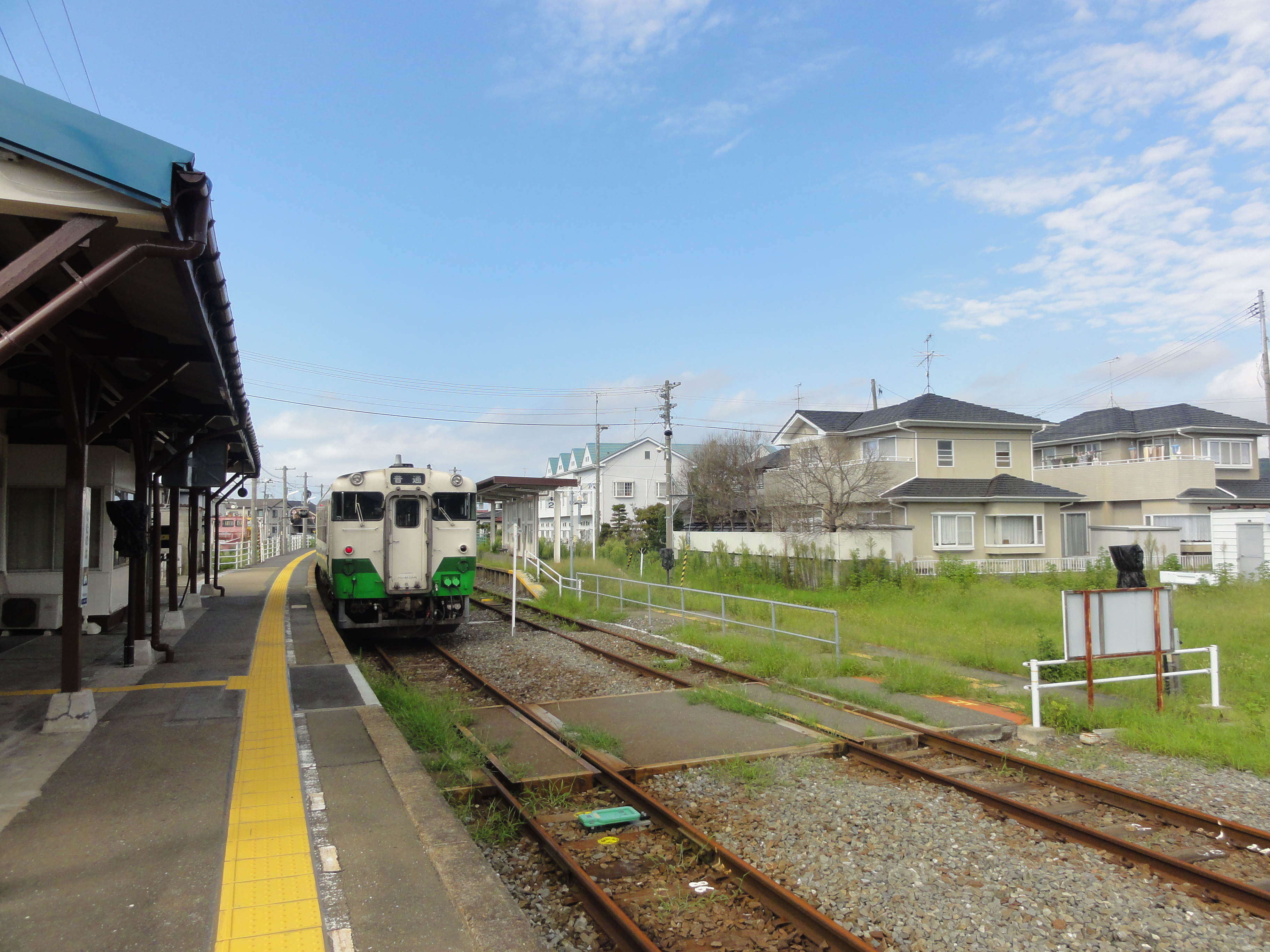 渡波駅 ホーム